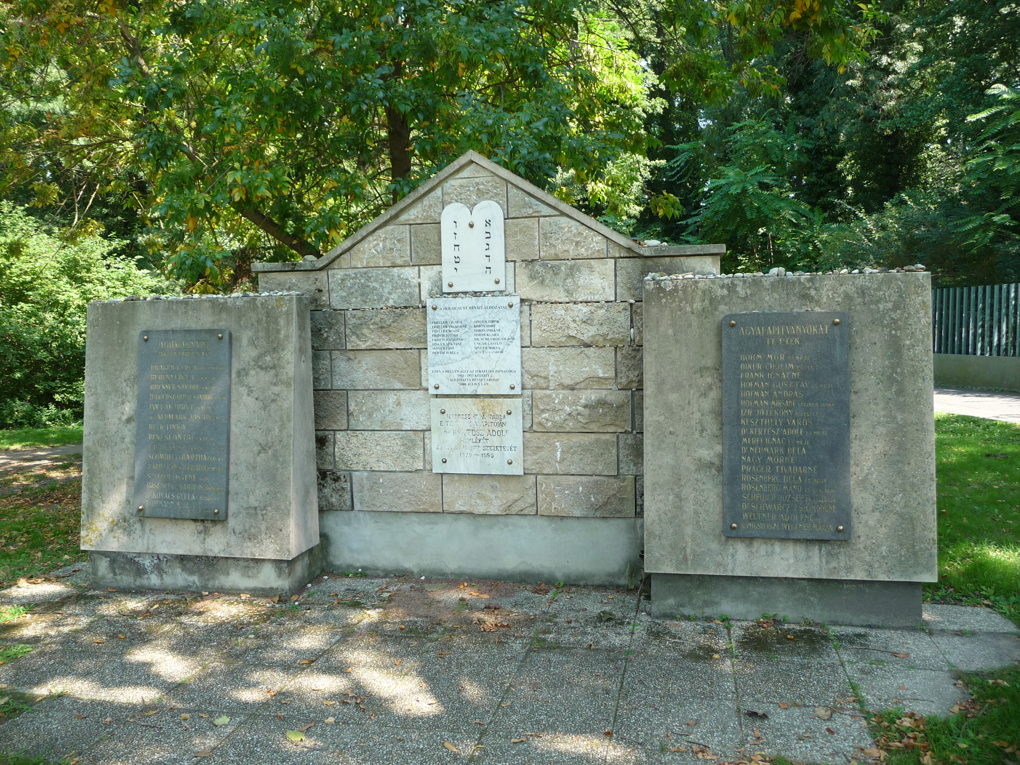 A zsidó áldozatok emlékműve az egykori zsinagóga helyén, Hévíz